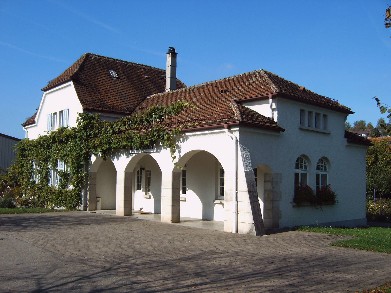 Bahnhofsgebäude Birenbach der ehemaligen Hohenstaufenbahn